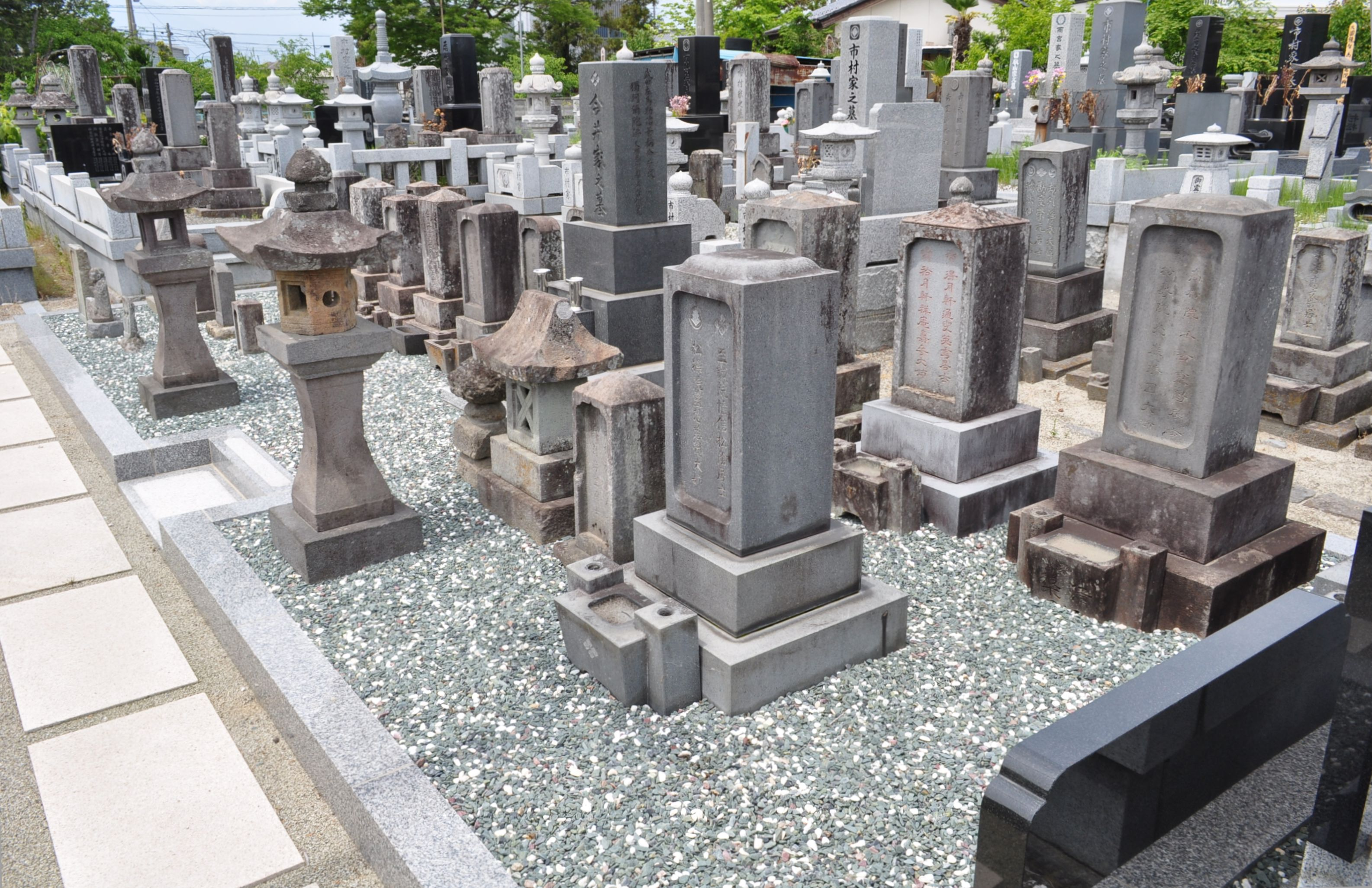 大龍山冨春院、今井家始祖の墓碑。